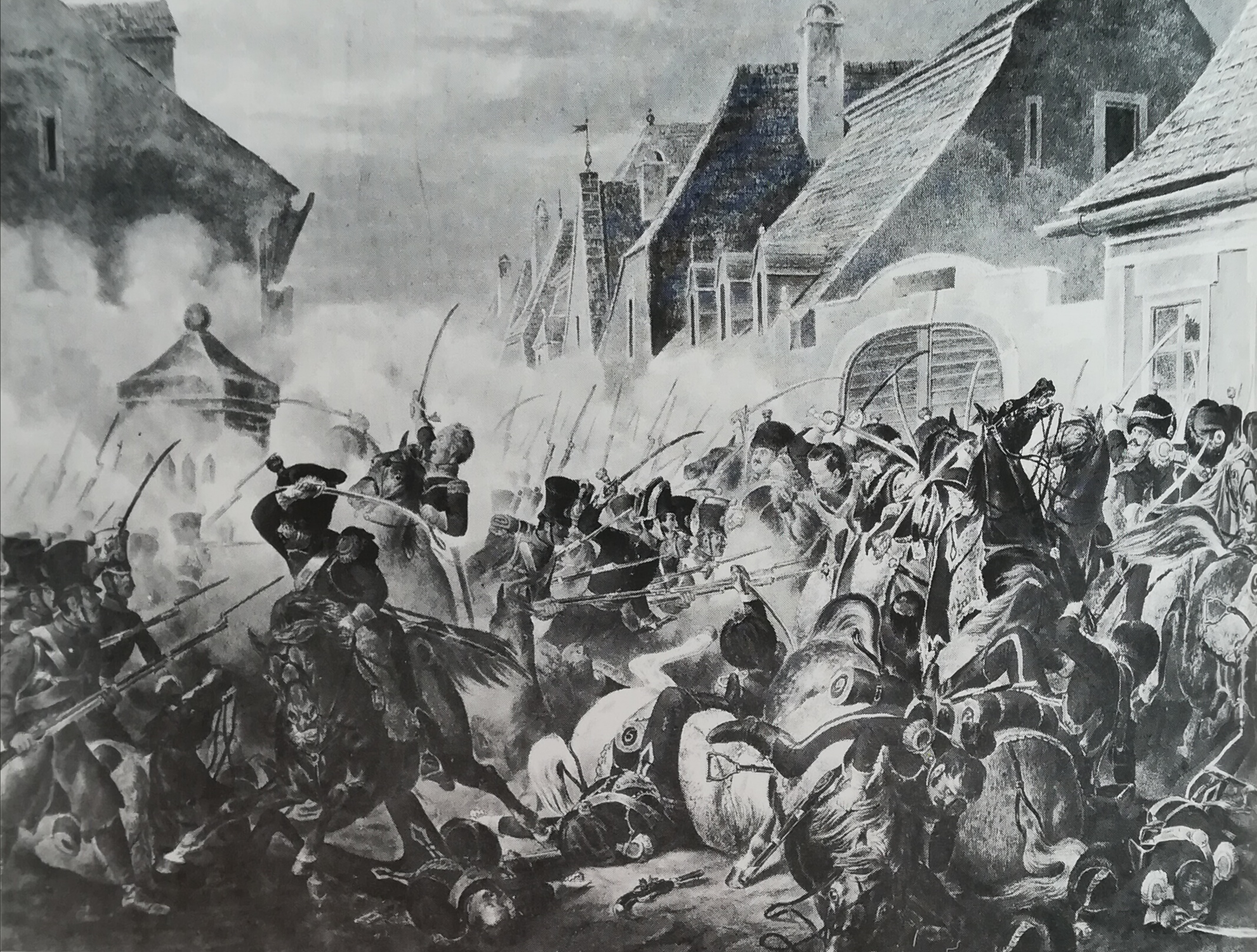 Combat de Neumarkt, 24 avril 1809. Au cours de cet affrontement, les troupes autrichiennes du général Hiller infligent un revers aux forces franco-bavaroises du maréchal Bessières.